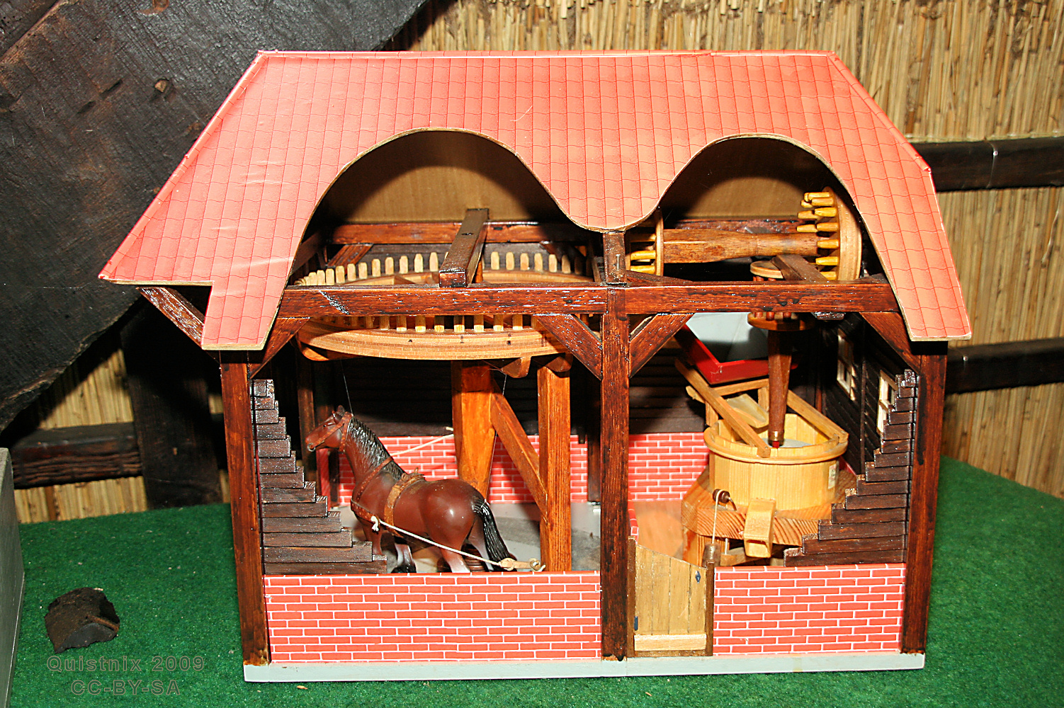 Model van een roskorenmolen, gefotografeerd in molen De Vlieger